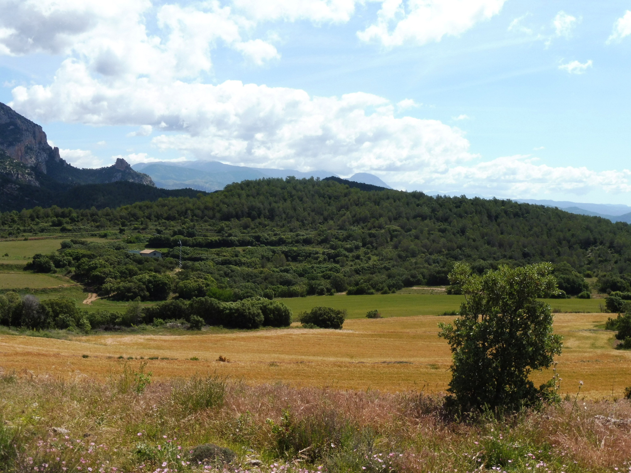 El Tossal de Cortiuda des del Poble Vell